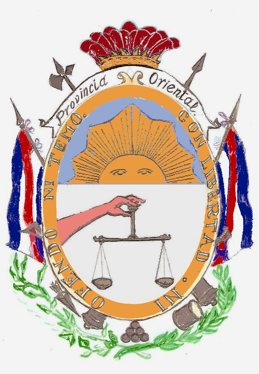 escudo de la provincia oriental basado enel Escudo_Provincia_Oriental.jpg de usuario:.jose